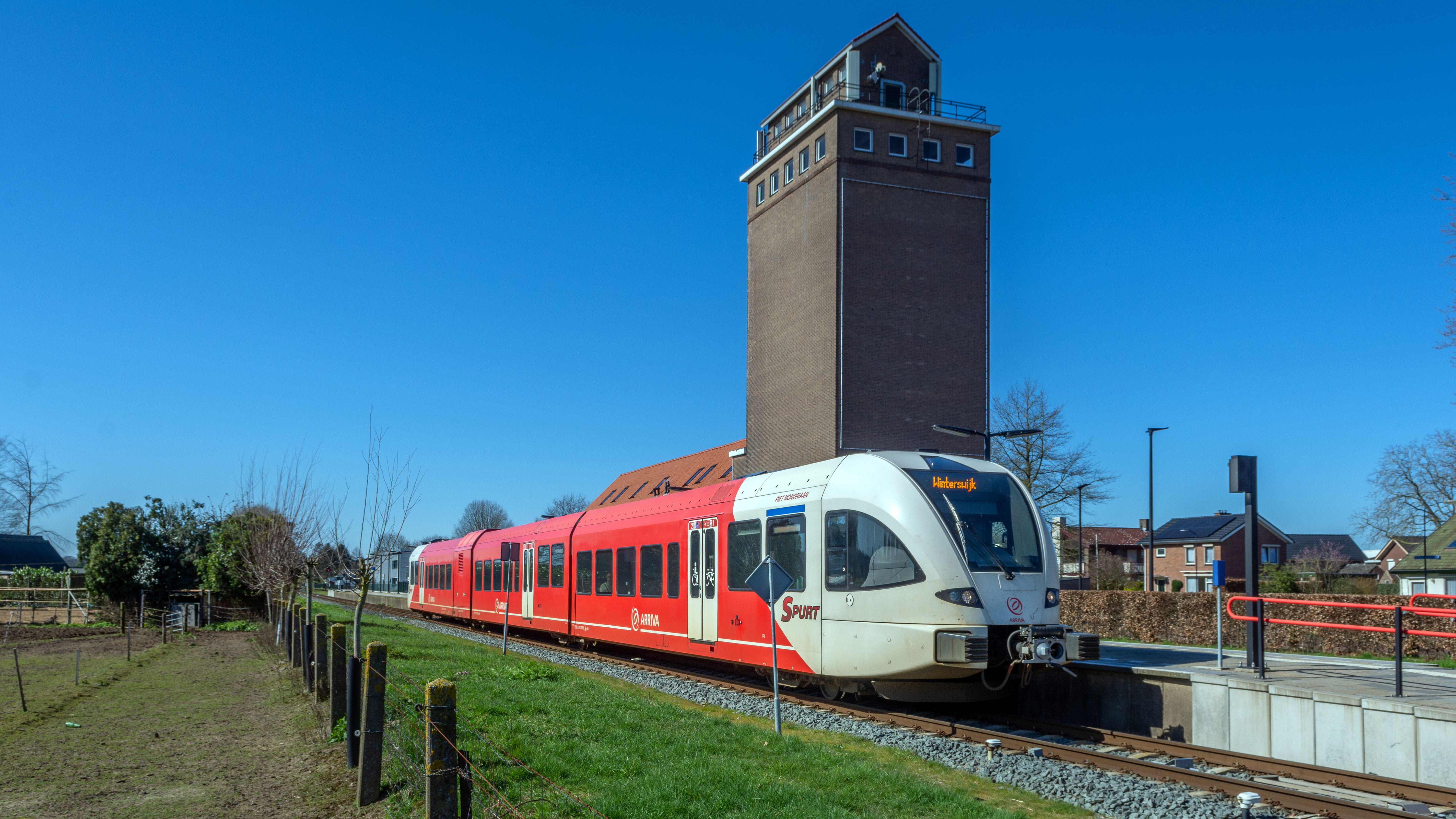 Op station Wehl met op de achtergrond de beeldbepalende Graansilo. Arriva GTW 2/8 stel 370 (Piet Mondriaan) staat klaar om als stoptrein 30933 naar Winterswijk te vertrekken